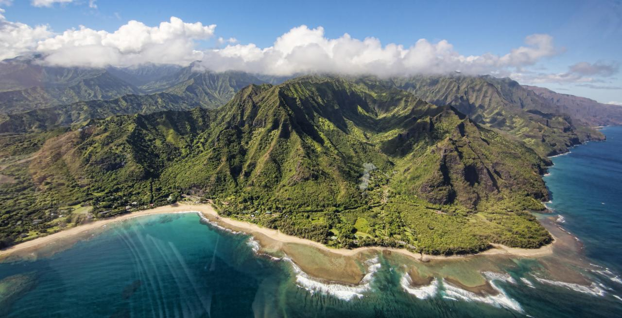 kauai